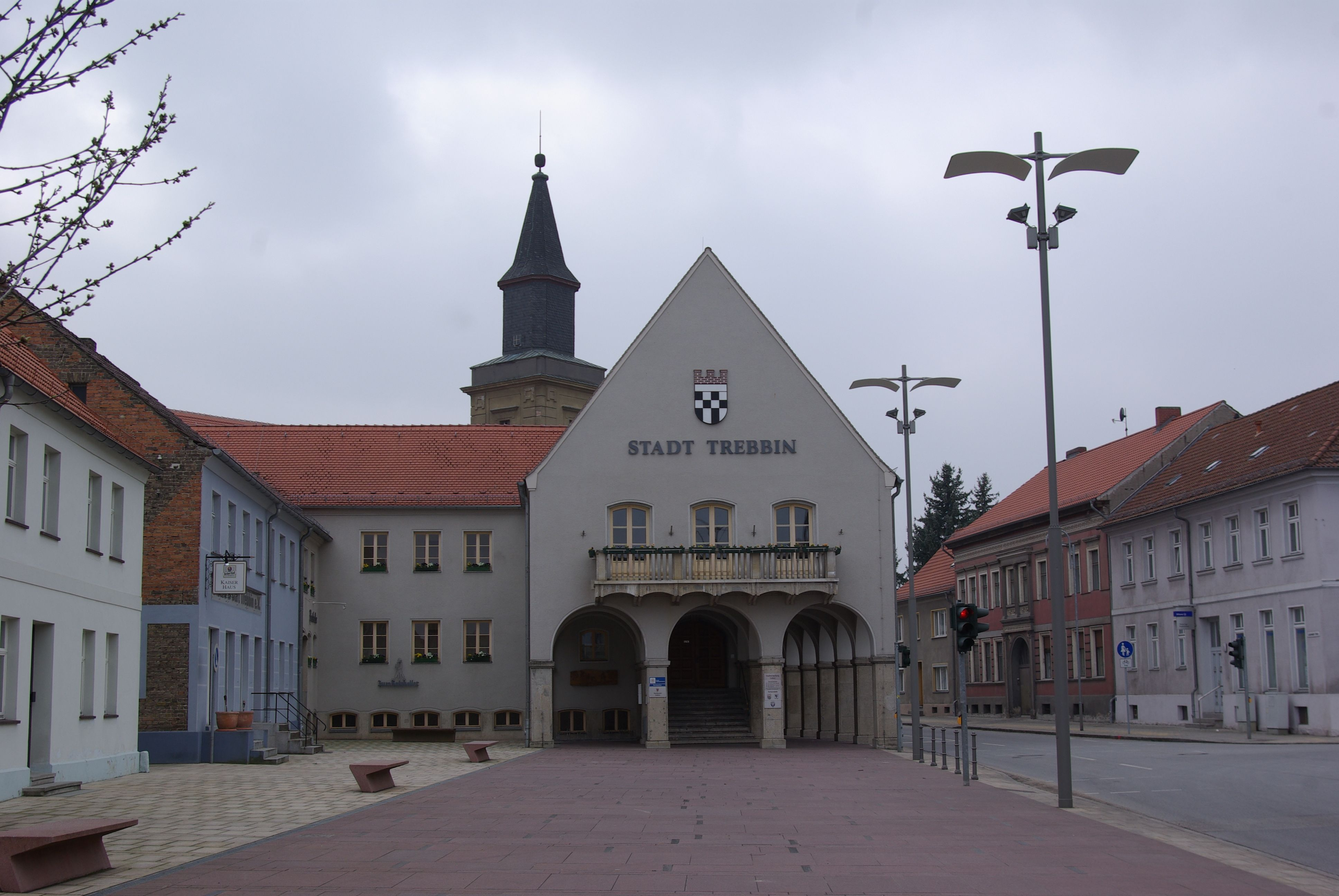 Trebbin, Brandenburg. Zu sehen ist das Rathaus. Im Hintergrund sieht man die Stadtkirche. Das rote Haus rechts ist das Haus Luckenwalder Straße 2, welches wie das Rathaus und die Kirche unter Denkmalschutz steht.